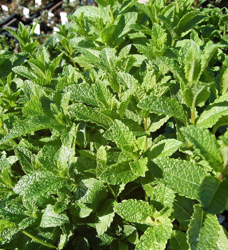 marokkanische Minze (Mentha spicata var. crispa)